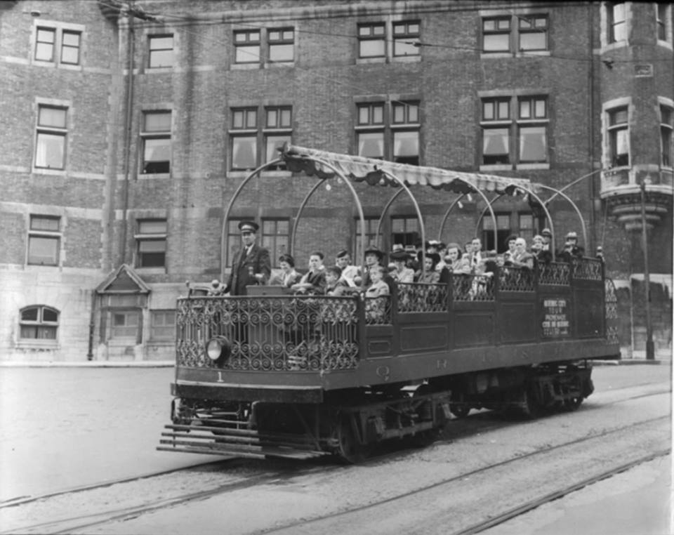 Le char observatoire à la place d’Armes en 1943 « Il s’agit d’un tramway électrique qui sillonne le réseau «ferré» de la ville intra-muros. Le wagon n’a pas de toiture permettant à ses occupants de bien voir les beautés de la «vieille» ville. Depuis un moment déjà, les touristes affluent à Québec et on développe des attractions pour agrémenter leur séjour. Le circuit débute au Château Frontenac et fait le tour de la ville par la côte de la Fabrique, les rues Saint-Jean, D’Auteuil et Saint-Louis. C’était l’ancêtre de nos actuels autobus à deux planchers et à ciel ouvert. » – Société historique de Québec « Il a été inauguré le 18 juin 1910. Il s'agissait d'un wagon comptant six rangées de sièges doubles en paliers. On y montait par un escalier situé à l’arrière. L’itinéraire avait pour point de départ la place d’Armes. La visite de la Haute-Ville et d’une partie de la Basse-Ville durait environ une heure et le tarif était de 0,50 $ pour le tour complet ou de 0,25 $ pour un parcours abrégé en soirée. Fonctionnant de la mi-mai à la mi-octobre, le char observatoire a été utilisé jusqu'à l'automne 1947. »